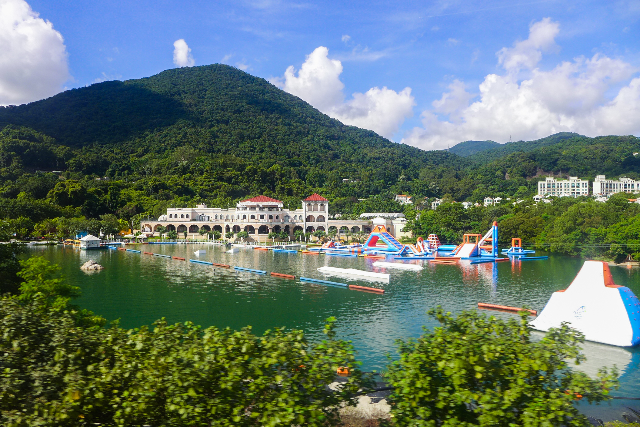 Kerry Lake Egret Nature Park